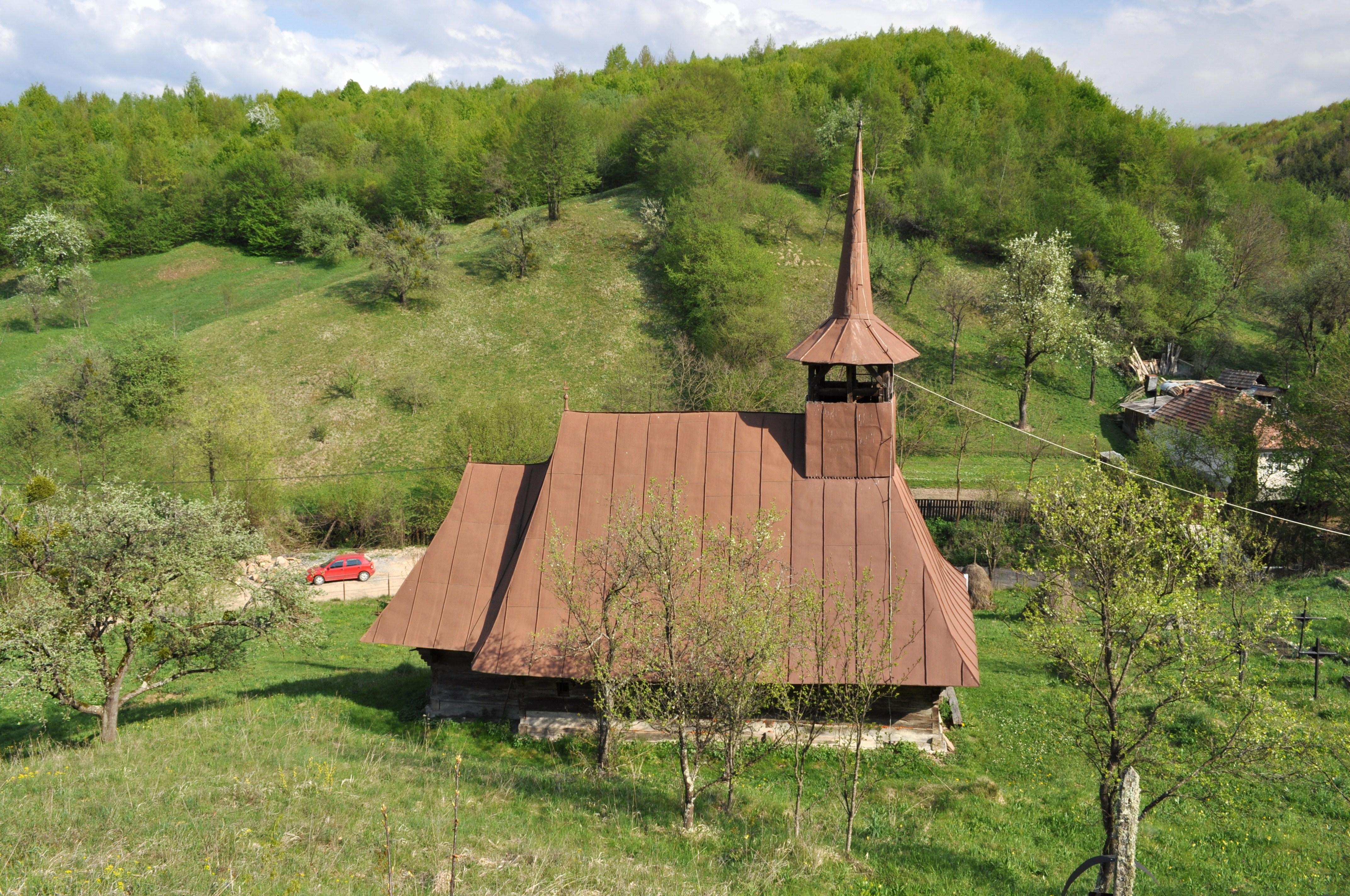 Biserica de lemn din Stolna, județul Cluj